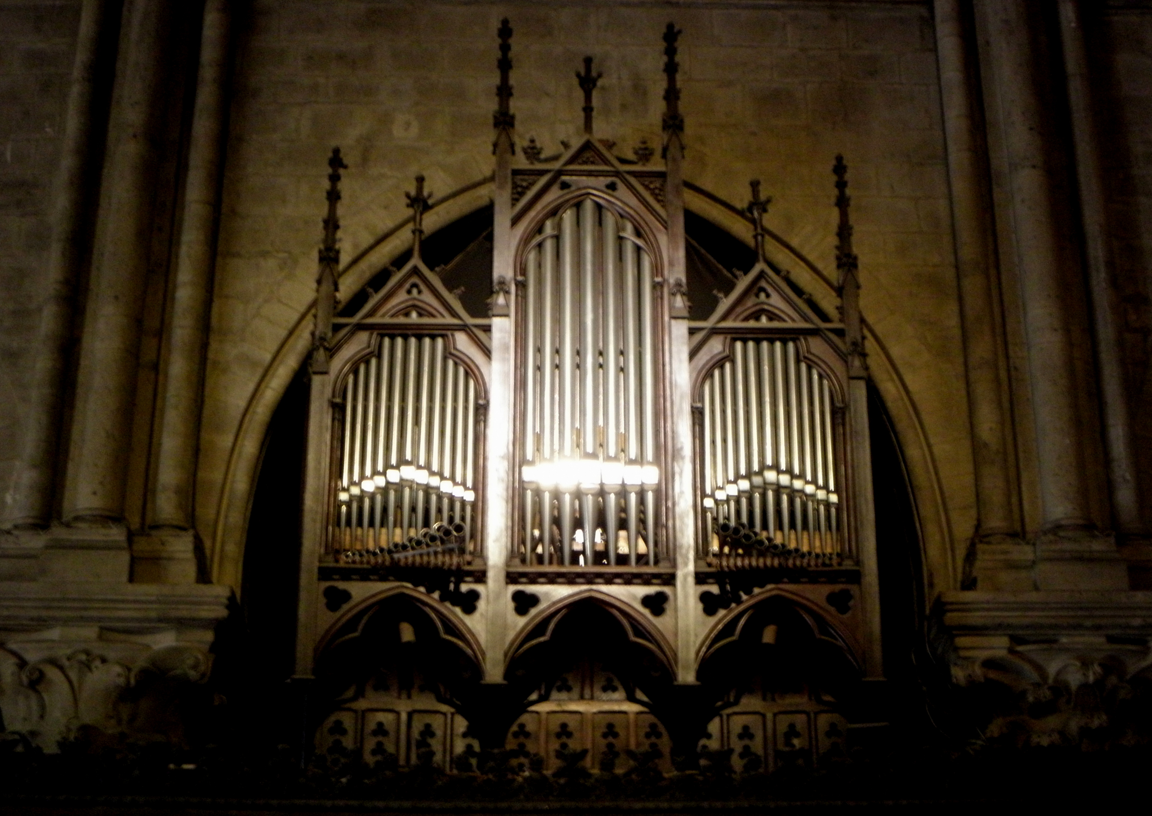 Orgue de choeur de la cathédrale Notre-Dame de Parias.